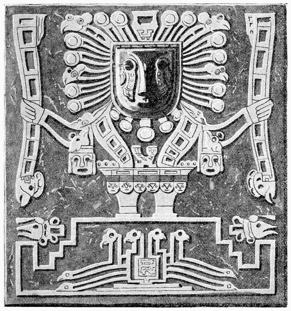 détail de la porte monolithe de tiaguanaco